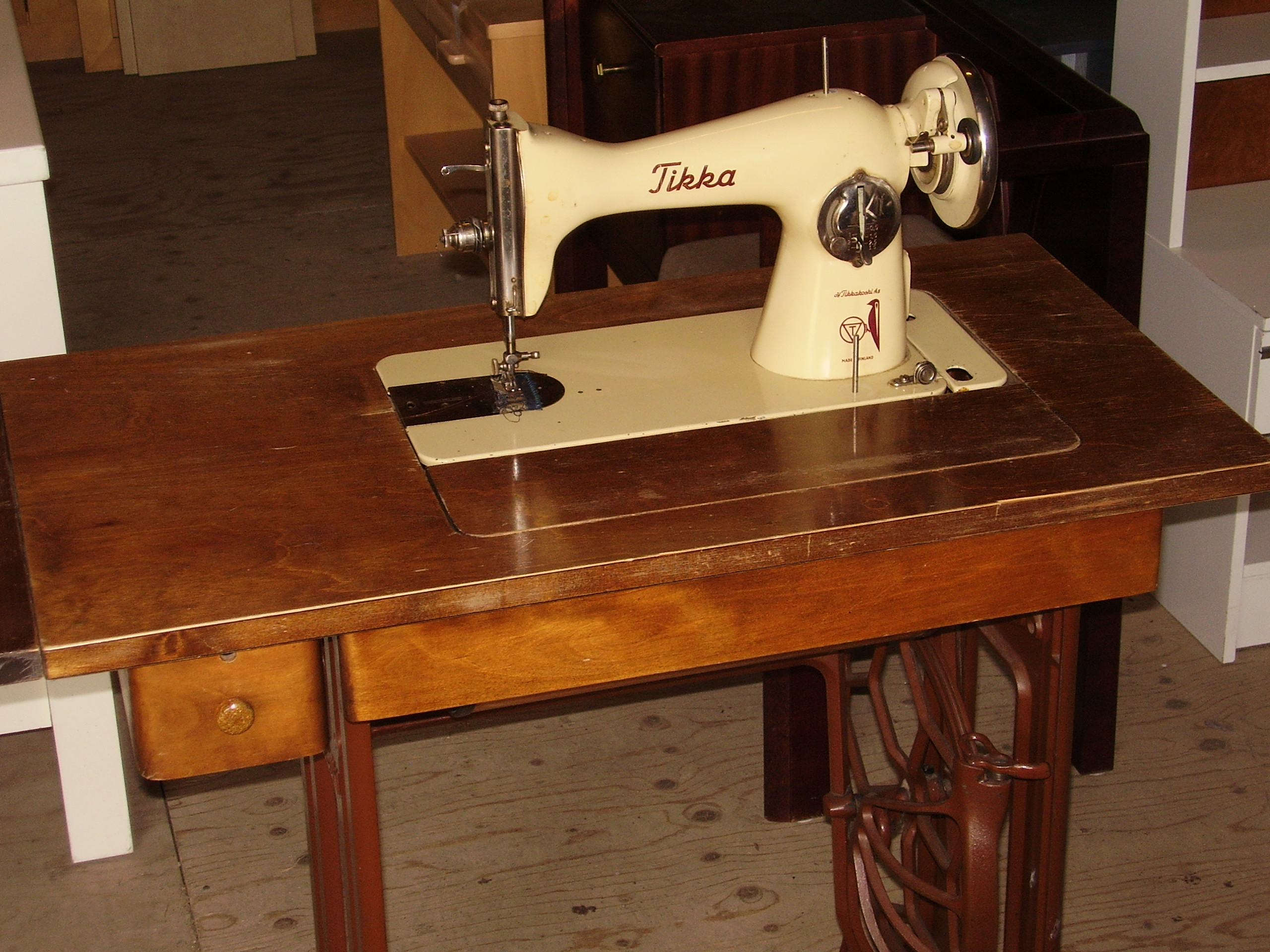 Tikka merkkinen ompelukone vuodelta 1951.